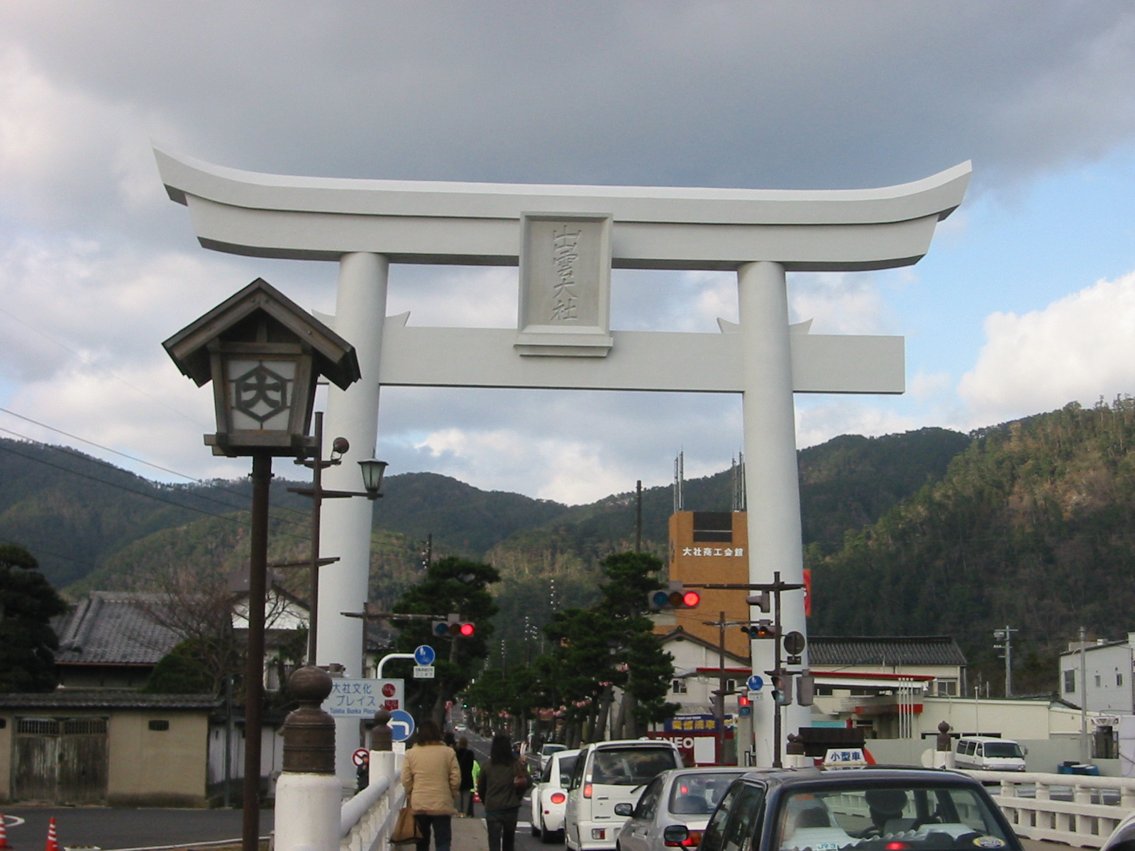 出雲大社 大鳥居